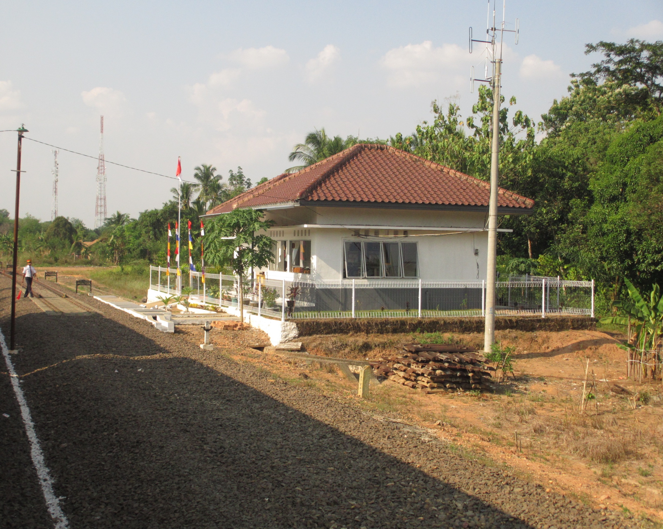 Stasiun Lubukbatang.